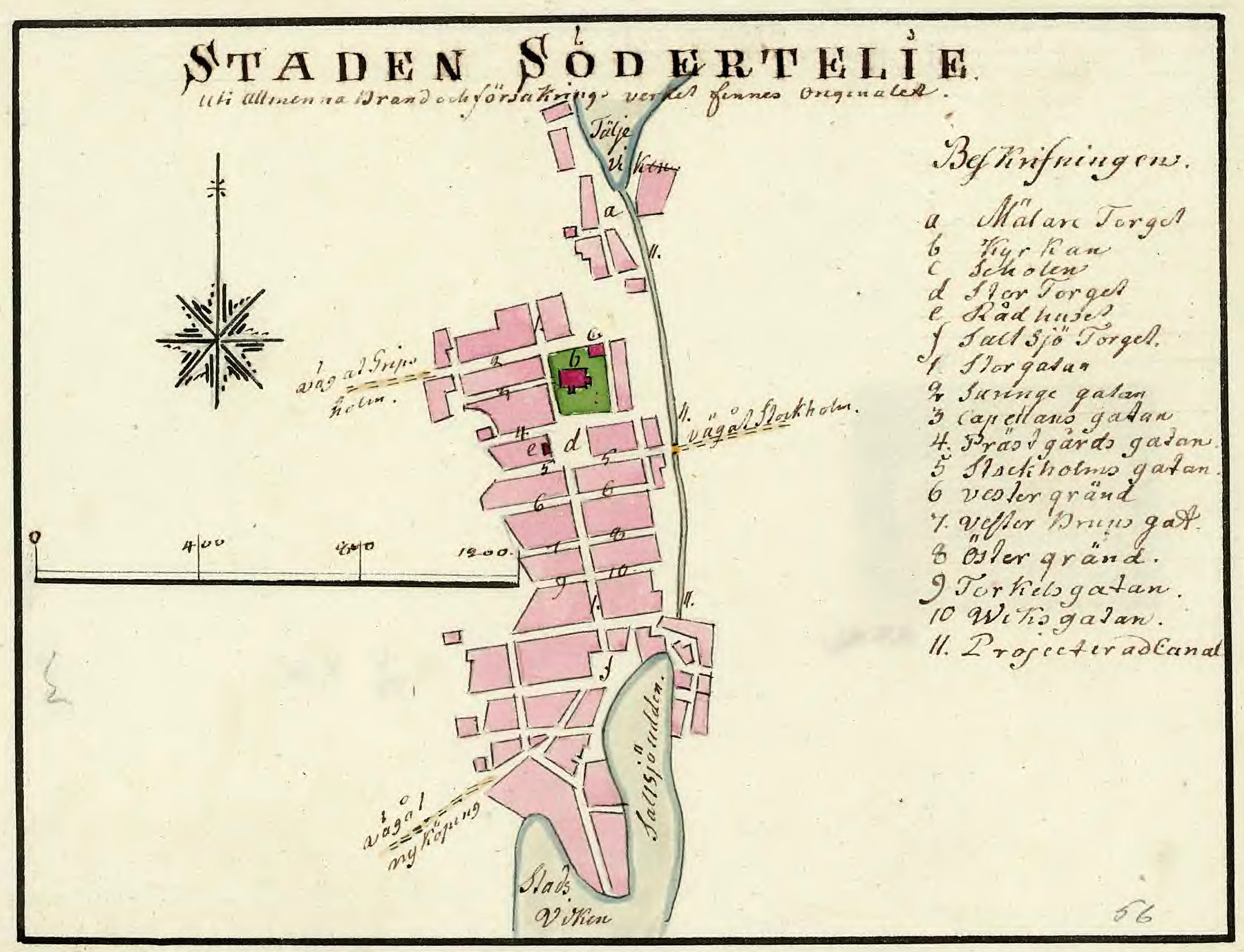 Södertälje stad